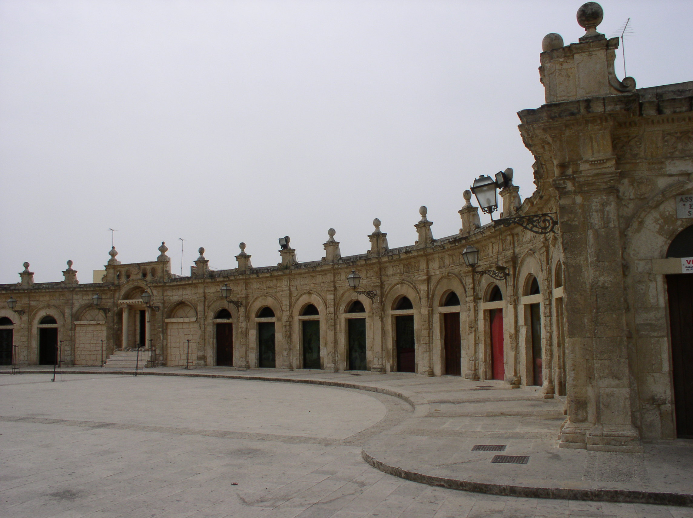 Loggiato di Santa Maria ad Ispica, opera di Vincenzo Sinatra. Author: Giuseppe Melfi.